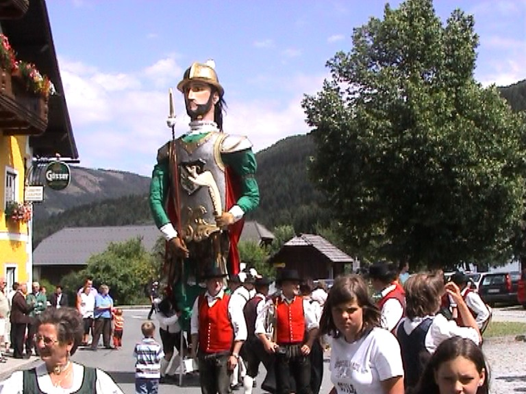 Samson from St. Margareten, Lungau, Austria